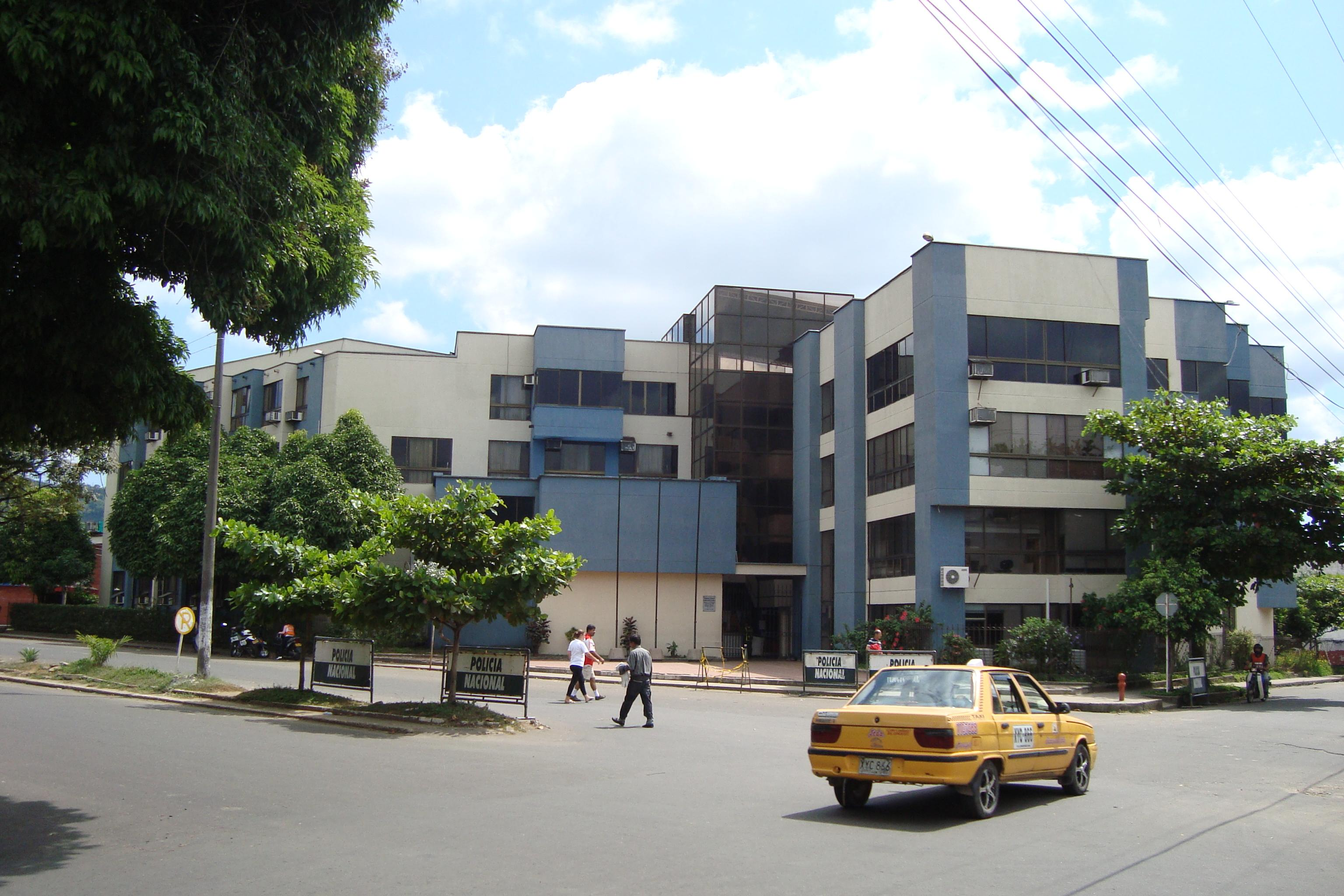 Palacio de Justicia de Florencia, Caquetá, Colombia